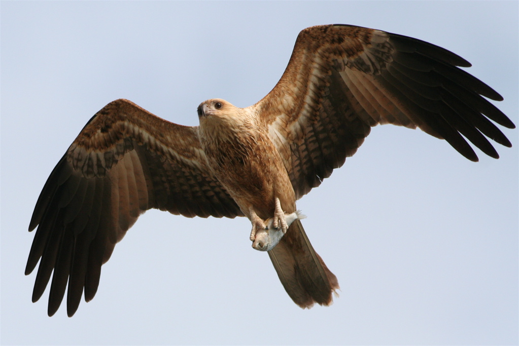 Whistling Kite (Haliastur sphenurus)